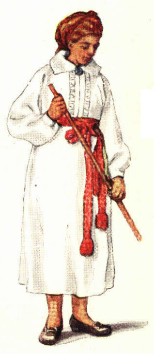 Folkdräkt från Herrestads härad (Skåne), Skördedräkt